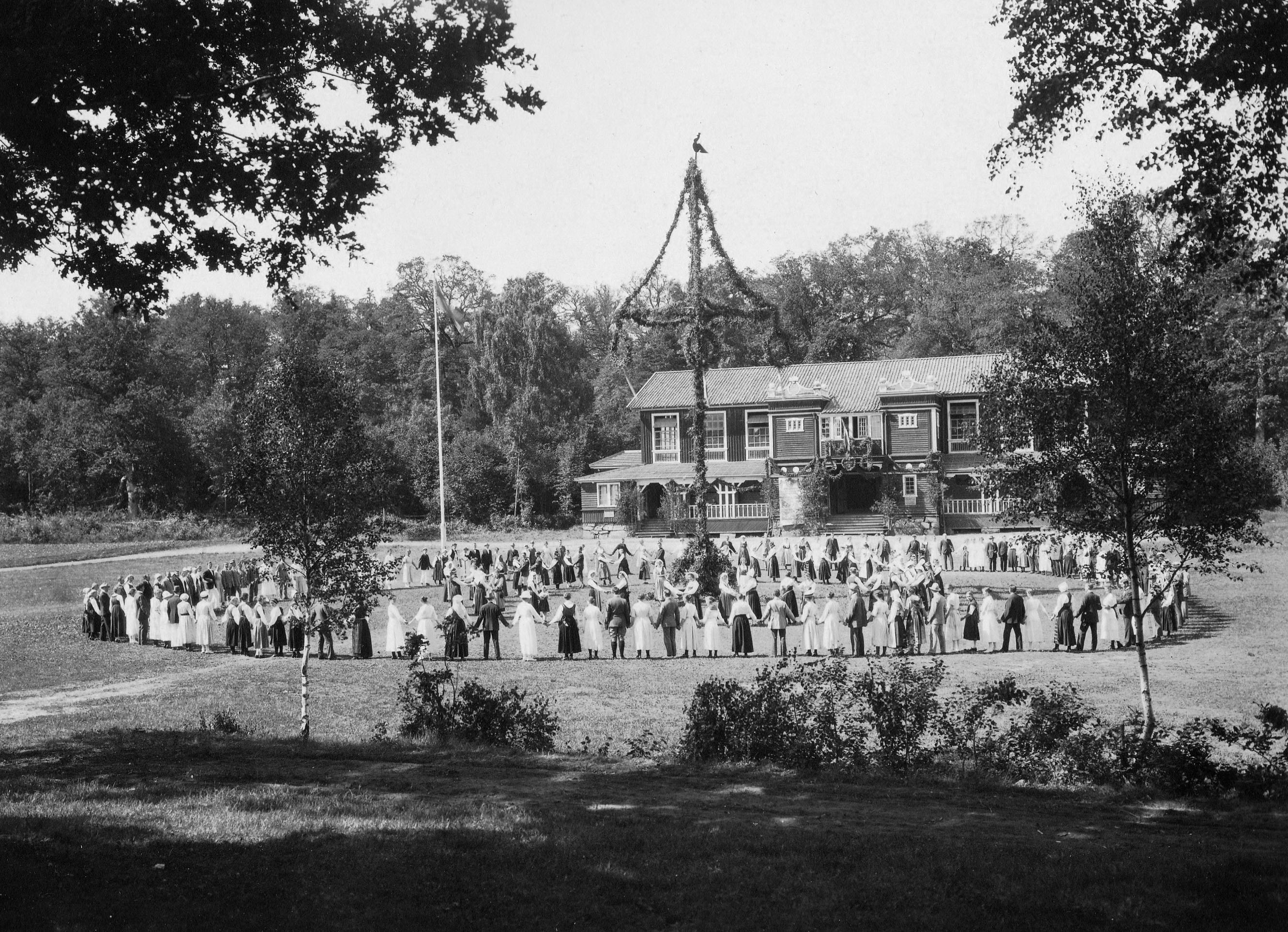 lektion i sånglekar och folkdanser